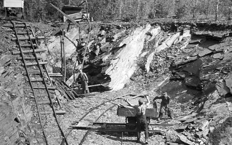 Thüringen, Schieferbruch Zentralbild, September 1948; Landeseigener Schieferbruch in Lehesten im Thüringer Wald. Blick in den Schieferbruch